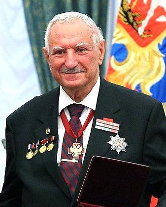 Президент России Владимир Путин награждает званием «Заслуженный деятель науки Российской Федерации» генерального конструктора ОАО «Московский научно-исследовательский институт «Агат» Иосифа Акопяна. 22 февраля 2013 года.